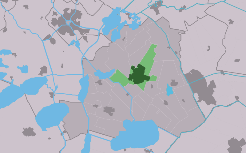 Kaartsje fan himrik fan De_Jouwer